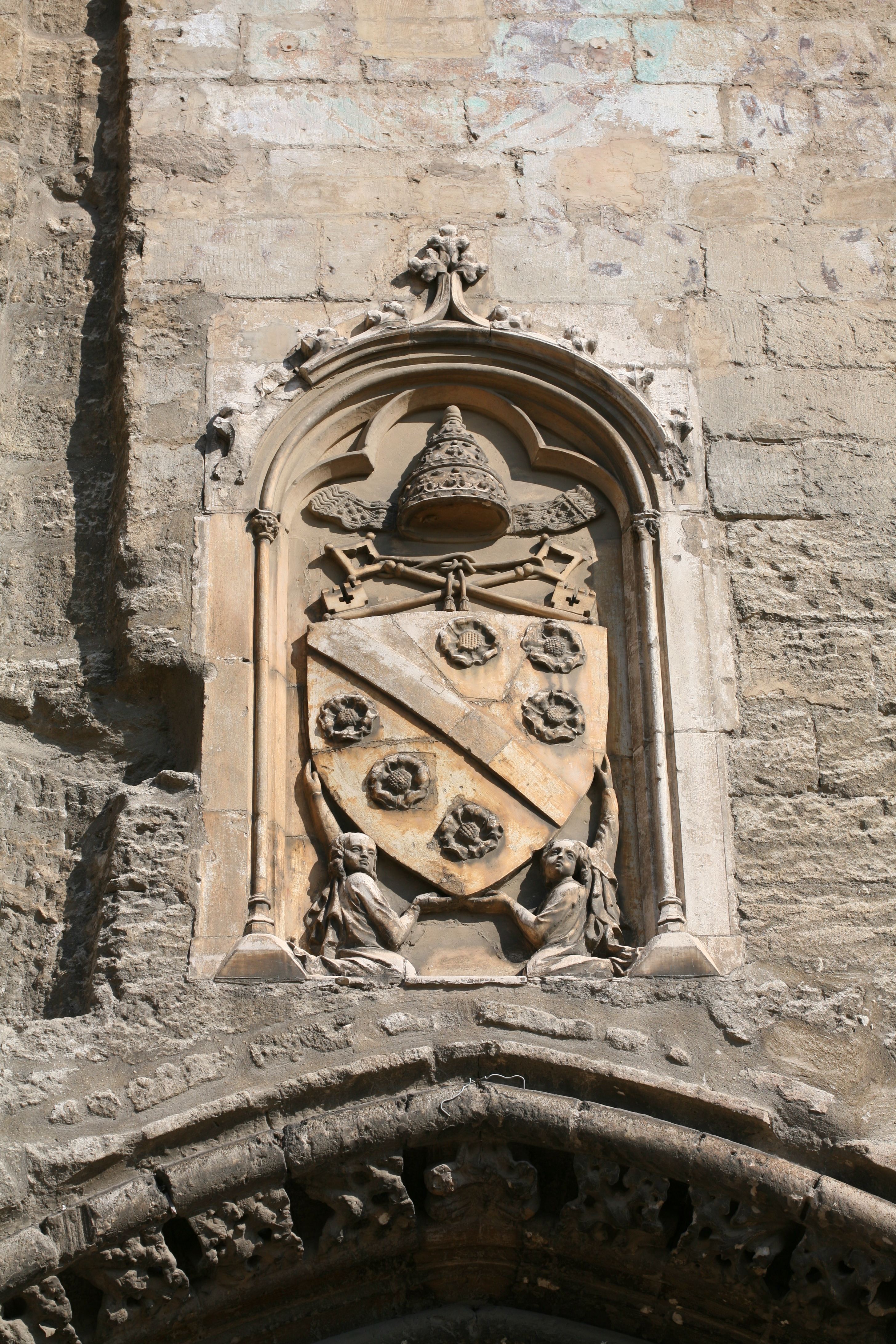 Les armes de Clément VI (armoiries des Roger) sur la Porte Champeaux, Palais des Papes, Avignon